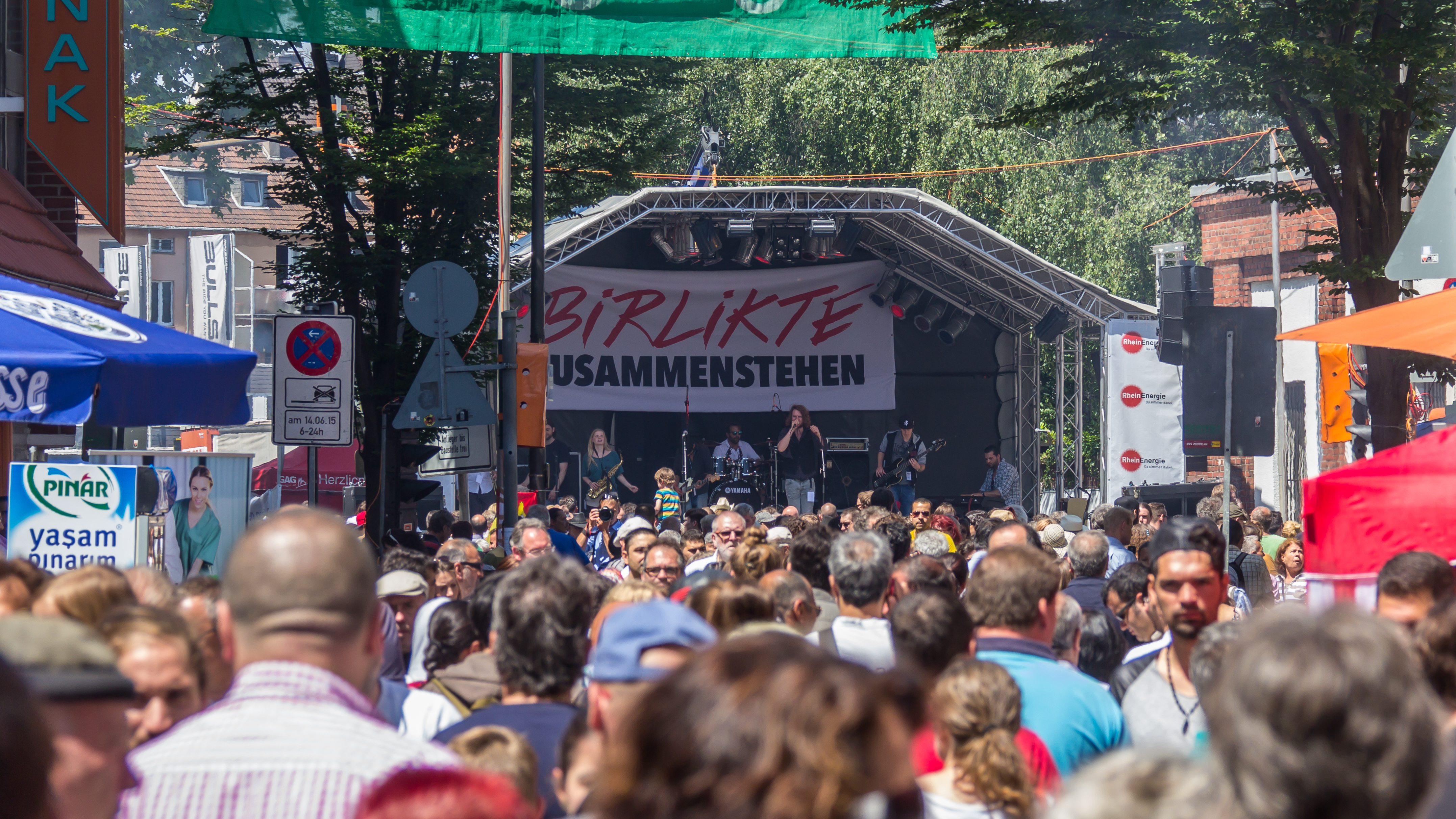 Birlikte - Zusammenstehen - 2015 Foto: Blick durch die Keupstraße in Richtung Westen zur zentralen Bühne